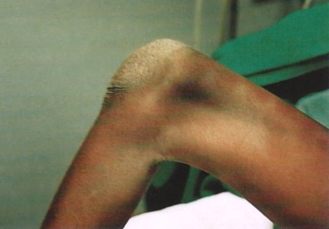 Massive Beugekontraktur der rechten (und linken) Kniegelenks bei 9-jährigem Angolaner, der über das Friedensdorf International ins Klinikum Plau am See gekommen war. Wohl nach einer frühkindlichen Poliomyelitis konnte der Junge nur auf den Knien und Händen gehen. Deshalb waren die Kniee wie sonst Fußsohlen beschwielt. In einer monatelangen Behandlung wurde er durch mehrere Tenotomien an den Hüft- und Kniegelenken auf die Füße gebracht und mit Knieorthesen gehfähig gemacht. Sein weiteres Schicksal ist nicht bekannt.